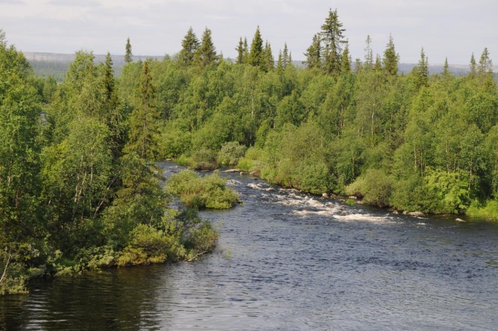 Река Куреньга